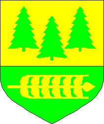 Kabala valla vapp